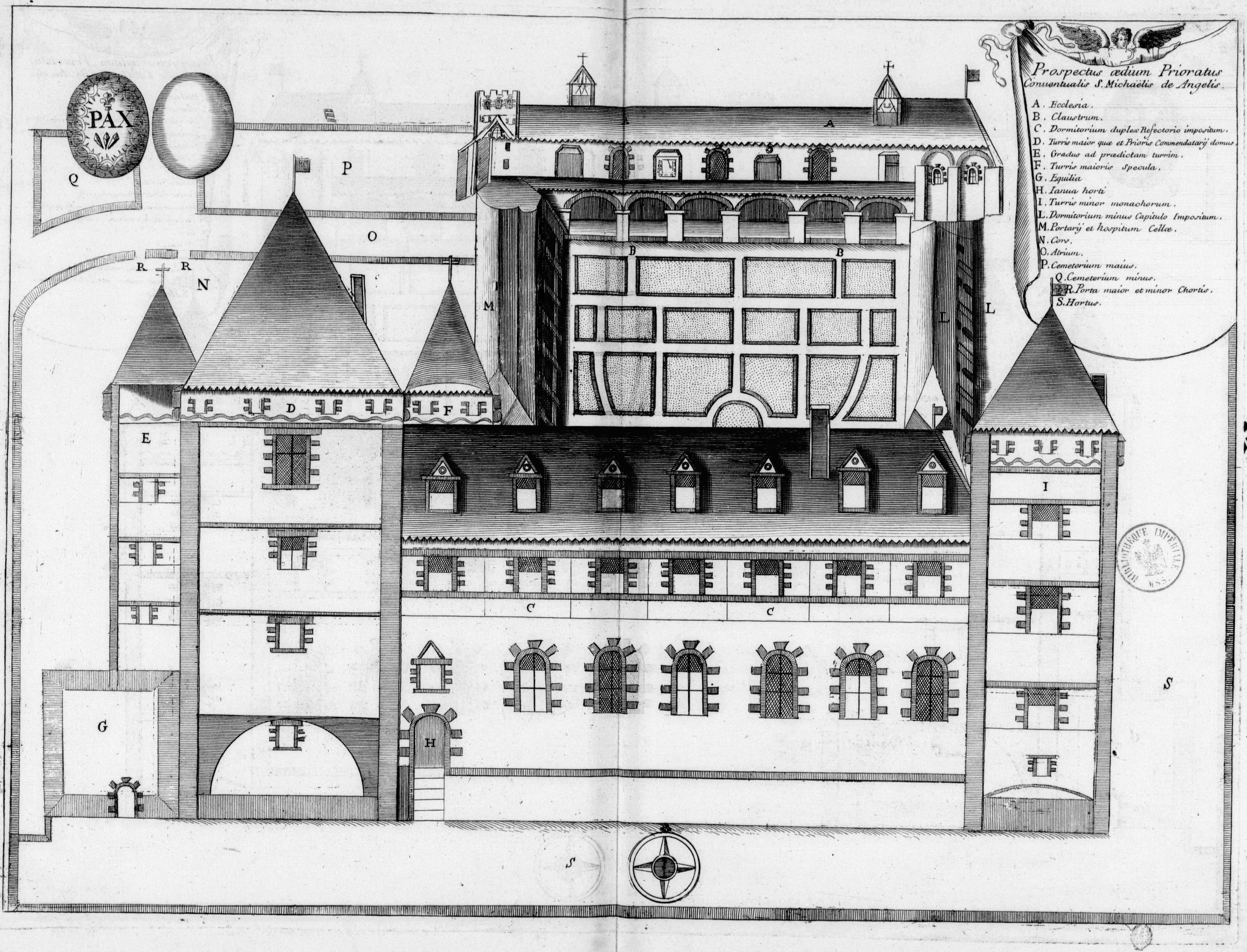 Planche gravée du 17ème siècle représentant le prieuré Saint-Michel-des-Anges, en France, dans le livre Monasticon Gallicanum.